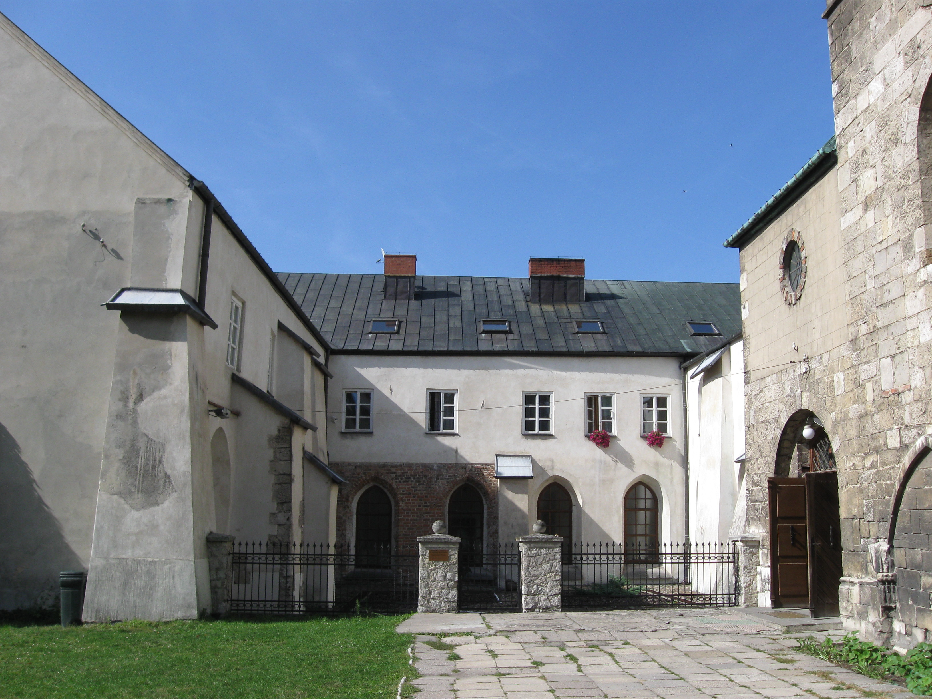 Opactwo cystersów.